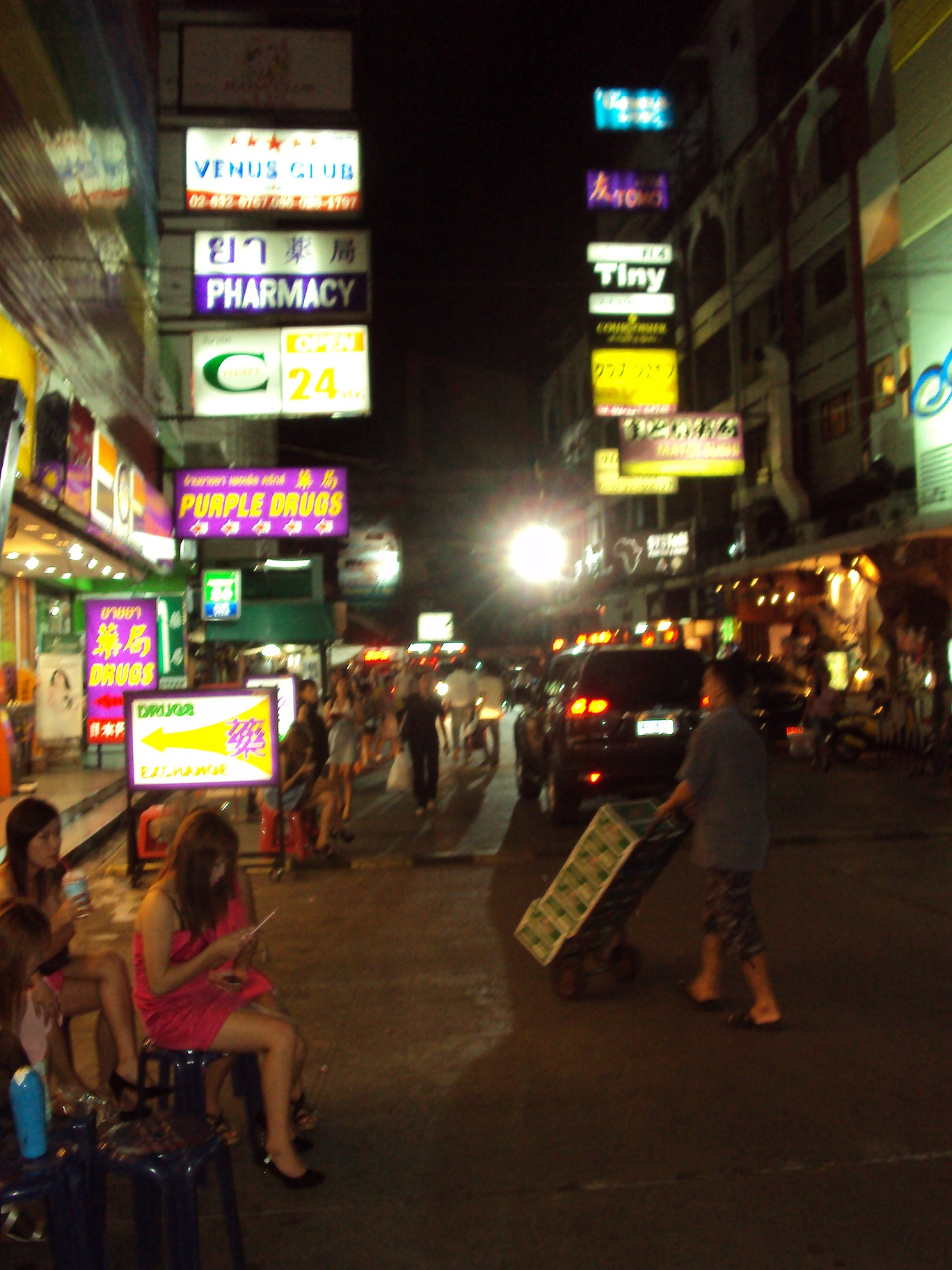 Soi Thaniya By Night